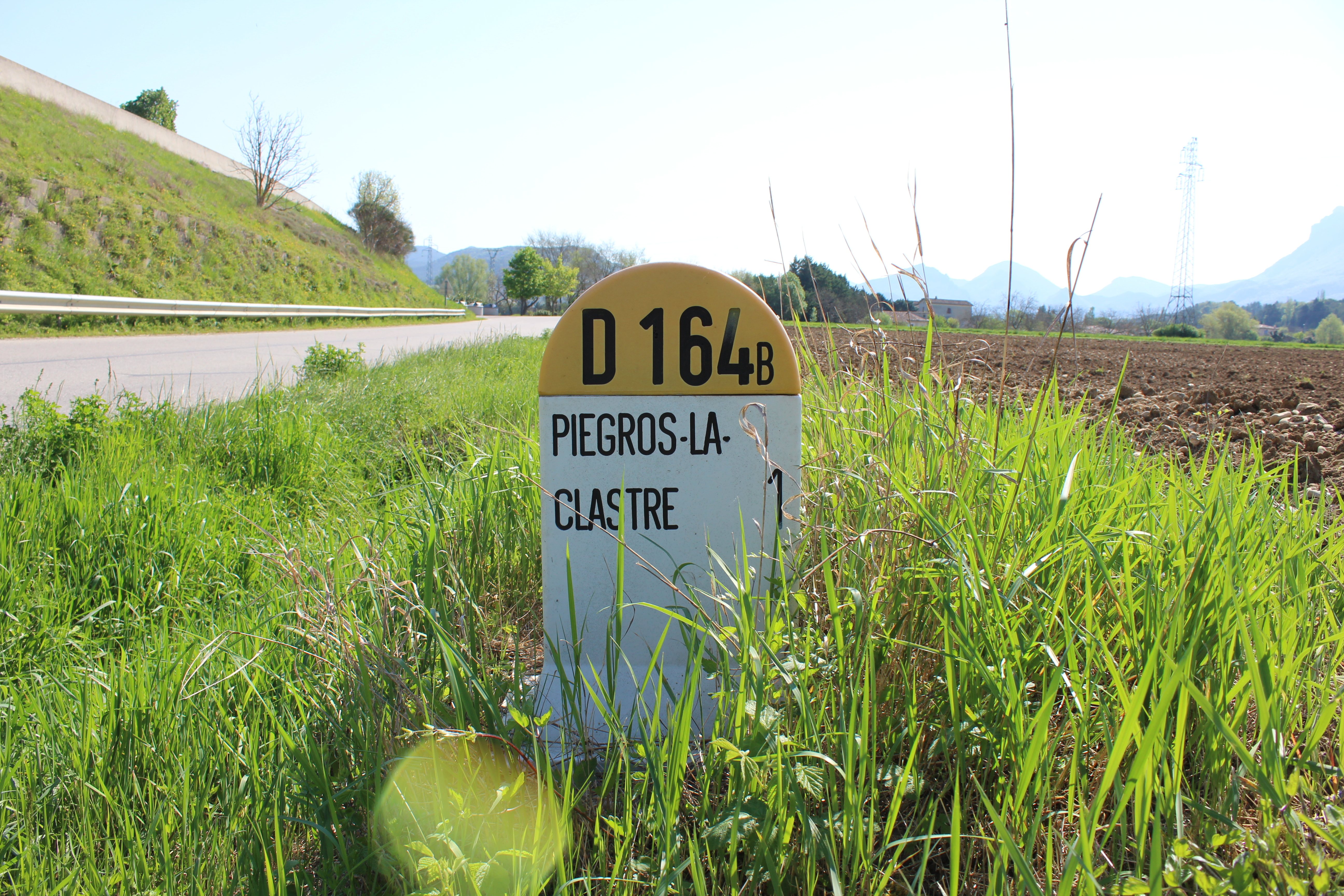 Photographie de l'arrêt de bus de la commune de Piégros-la-Clastre